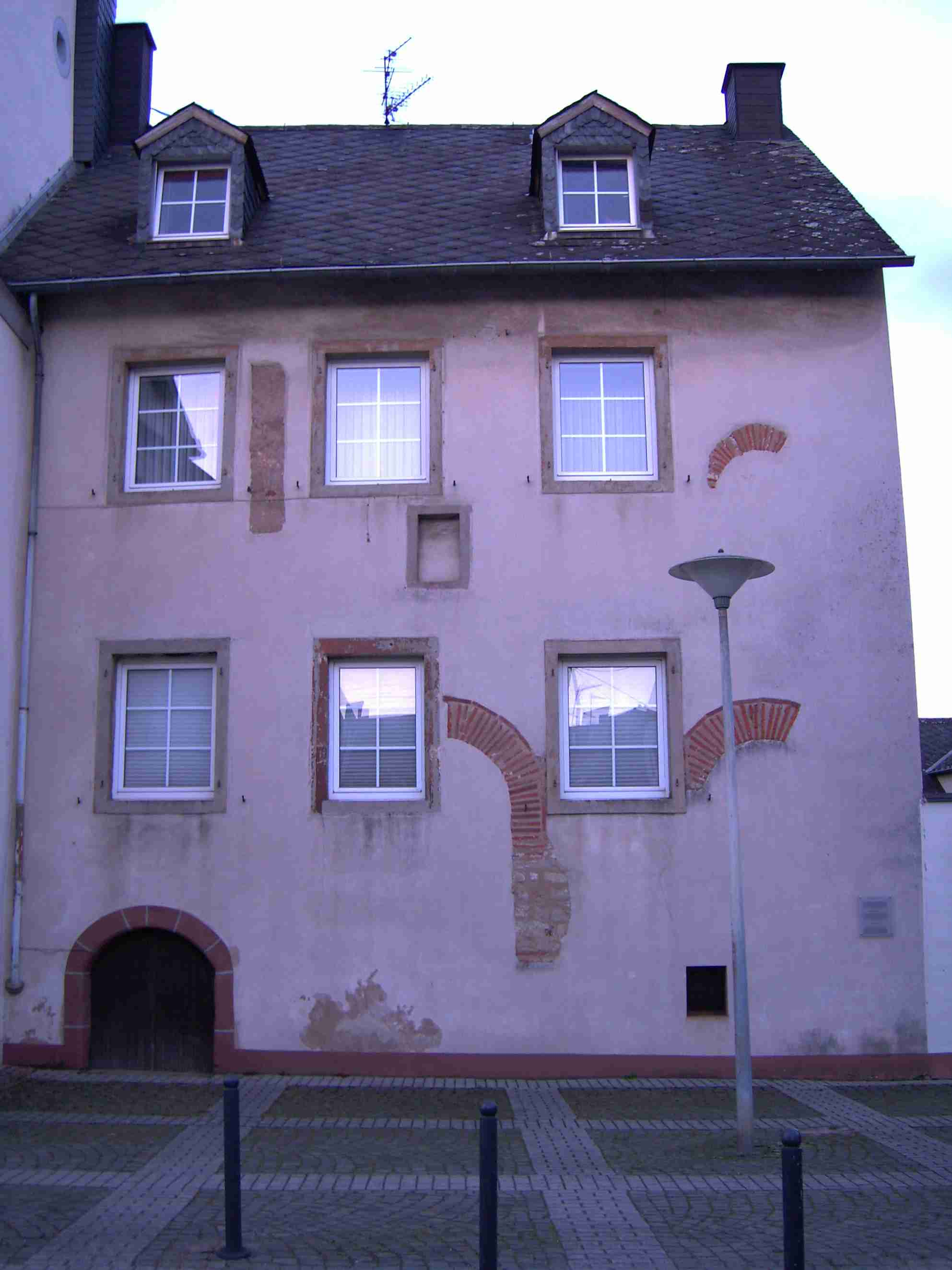 Das älteste, bewohnte Steinhaus Deutschlands in Trier Pfalzel. (27. April 2005) Fotograf: Nils Orth